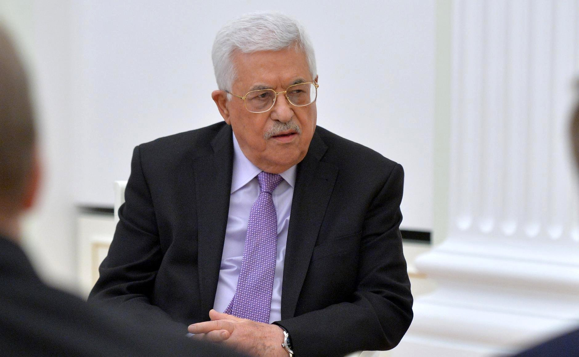 Президент Государства Палестина Махмуд Аббас во время встречи с Президента России Владимиром Путиным